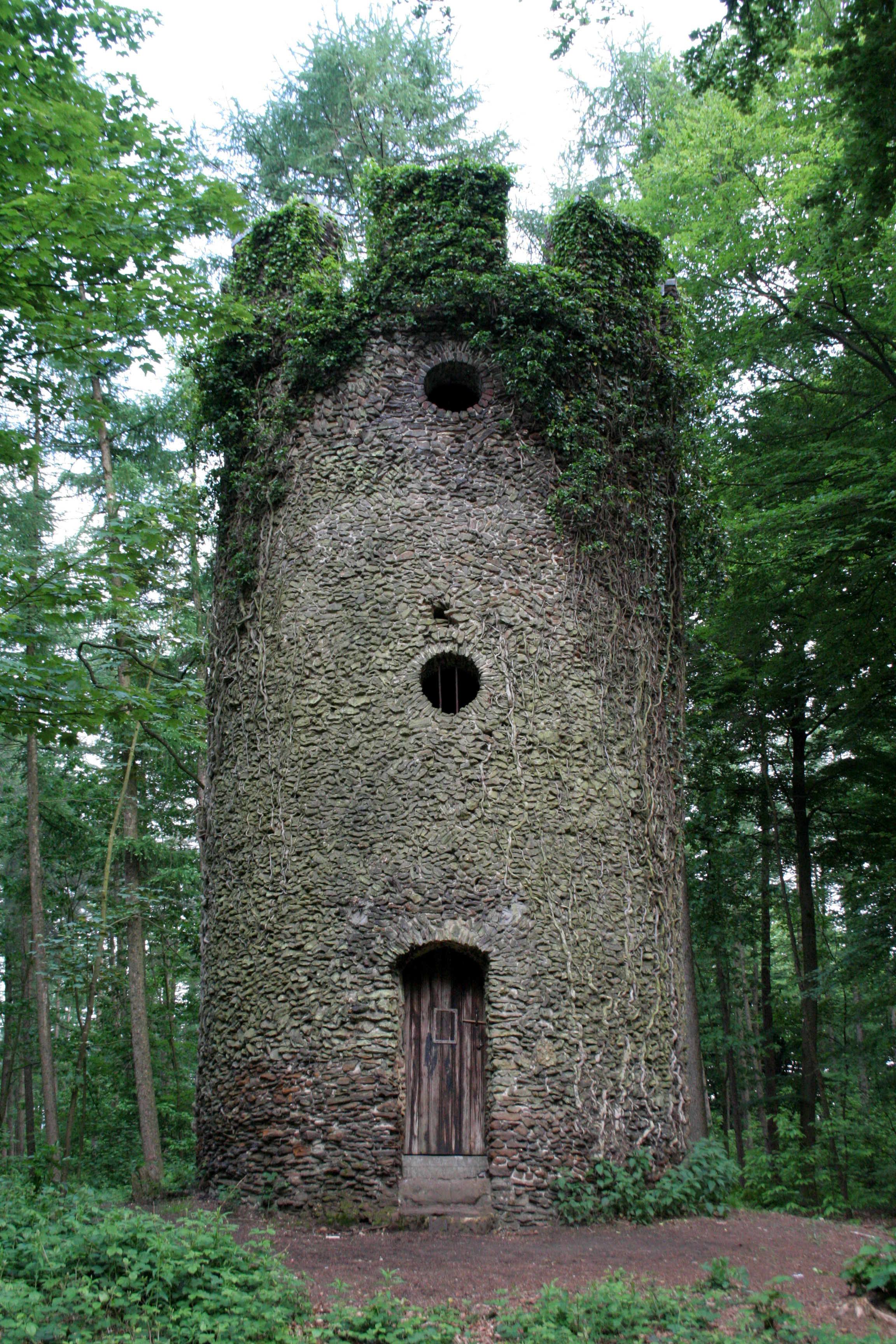 totaalzicht van de Geuzentoren, Ronse.